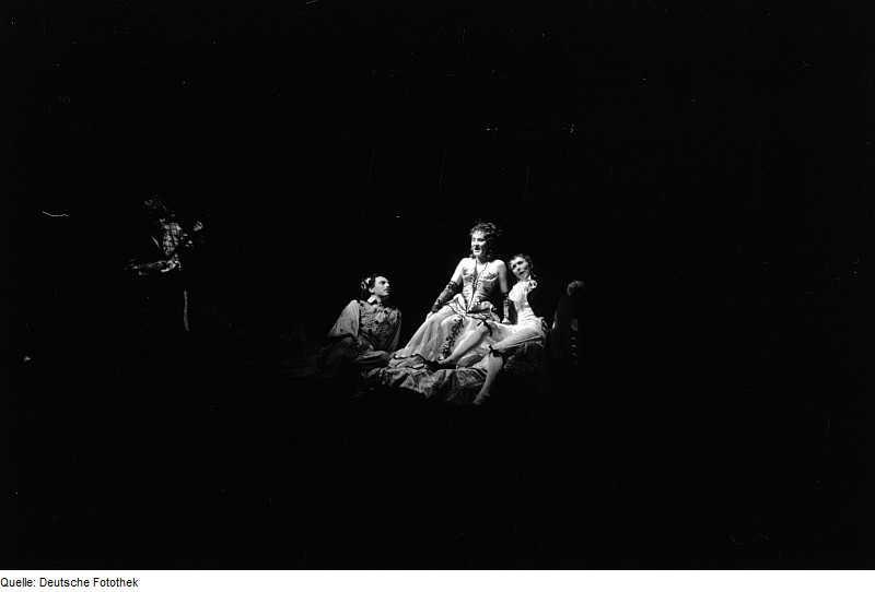 Original image description from the Deutsche Fotothek Gruppenbild mit Regisseur Ernst Legal